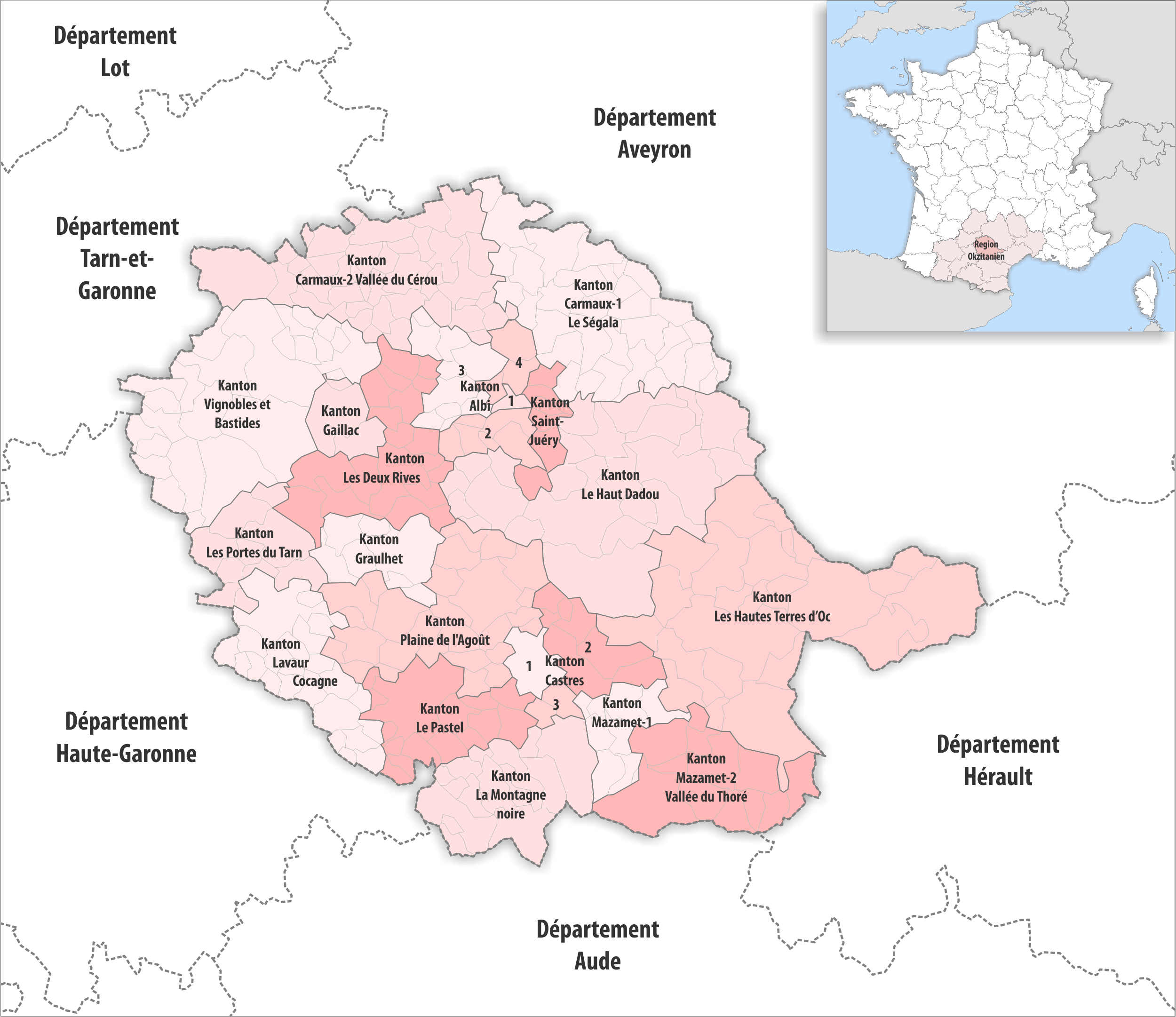 Gemeinden und Kantone im Departement Tarn